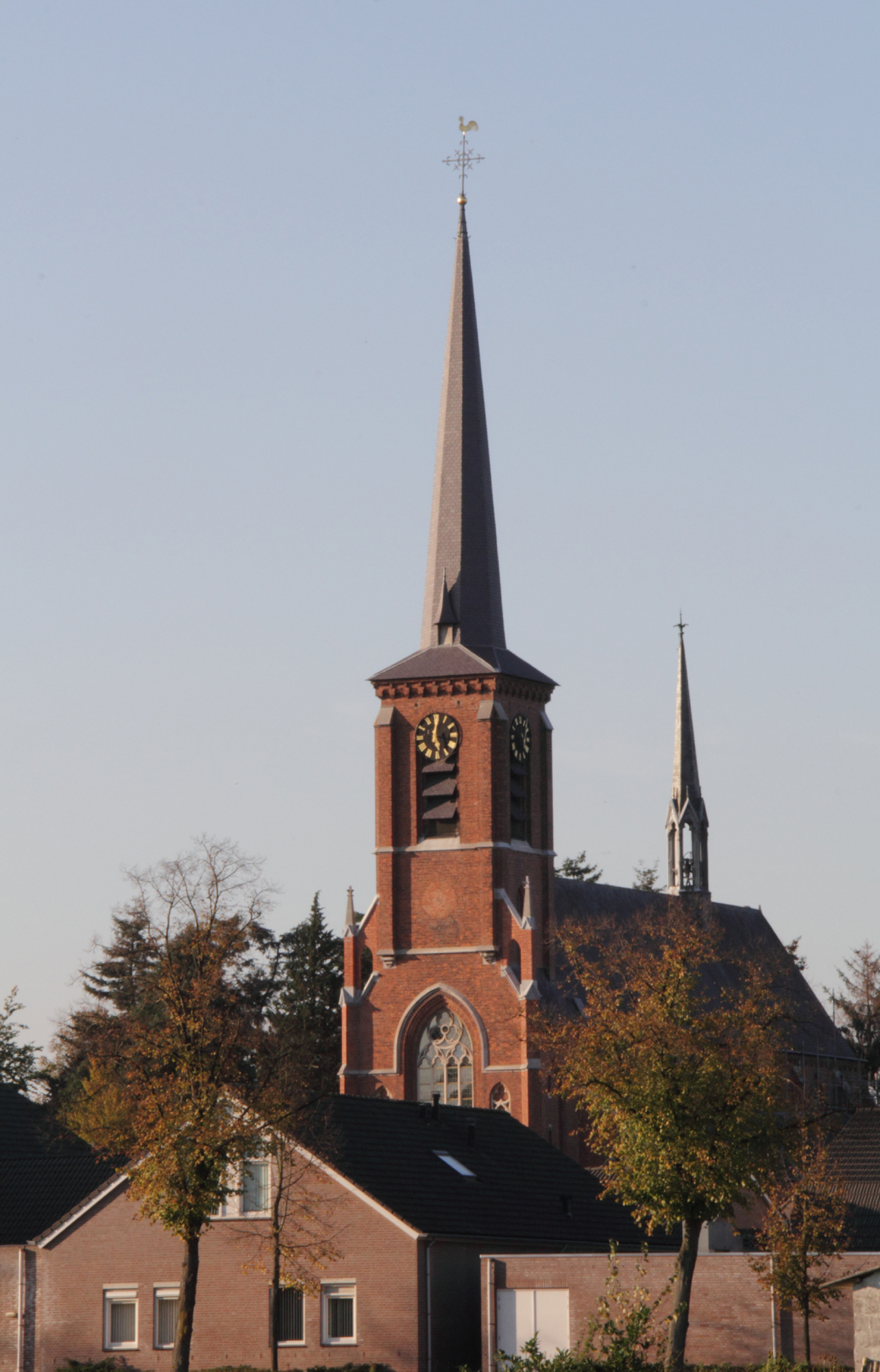 Church of Westerhoven Saint Servatius